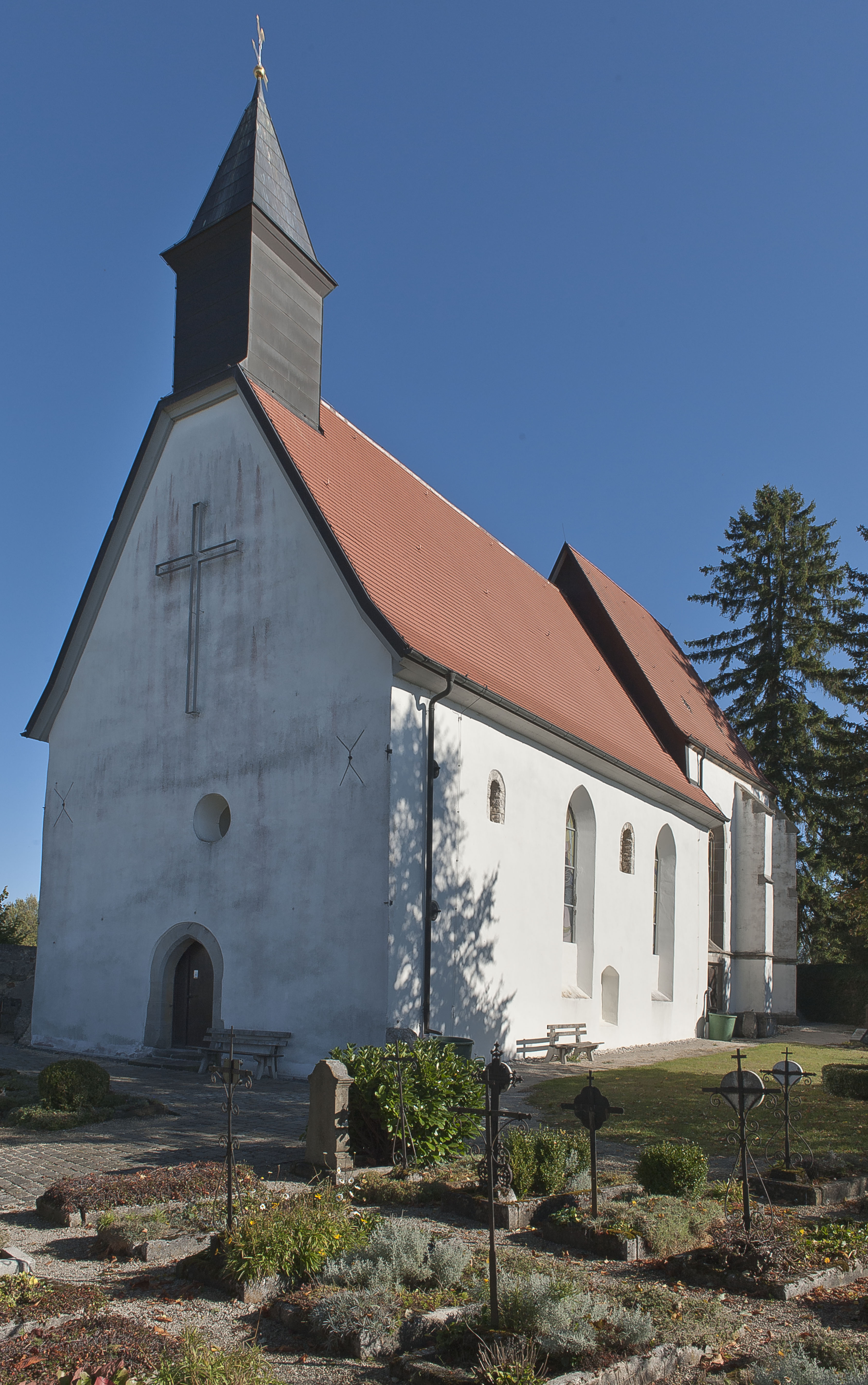 Stephanuskirche und Friedhof, Gruorn